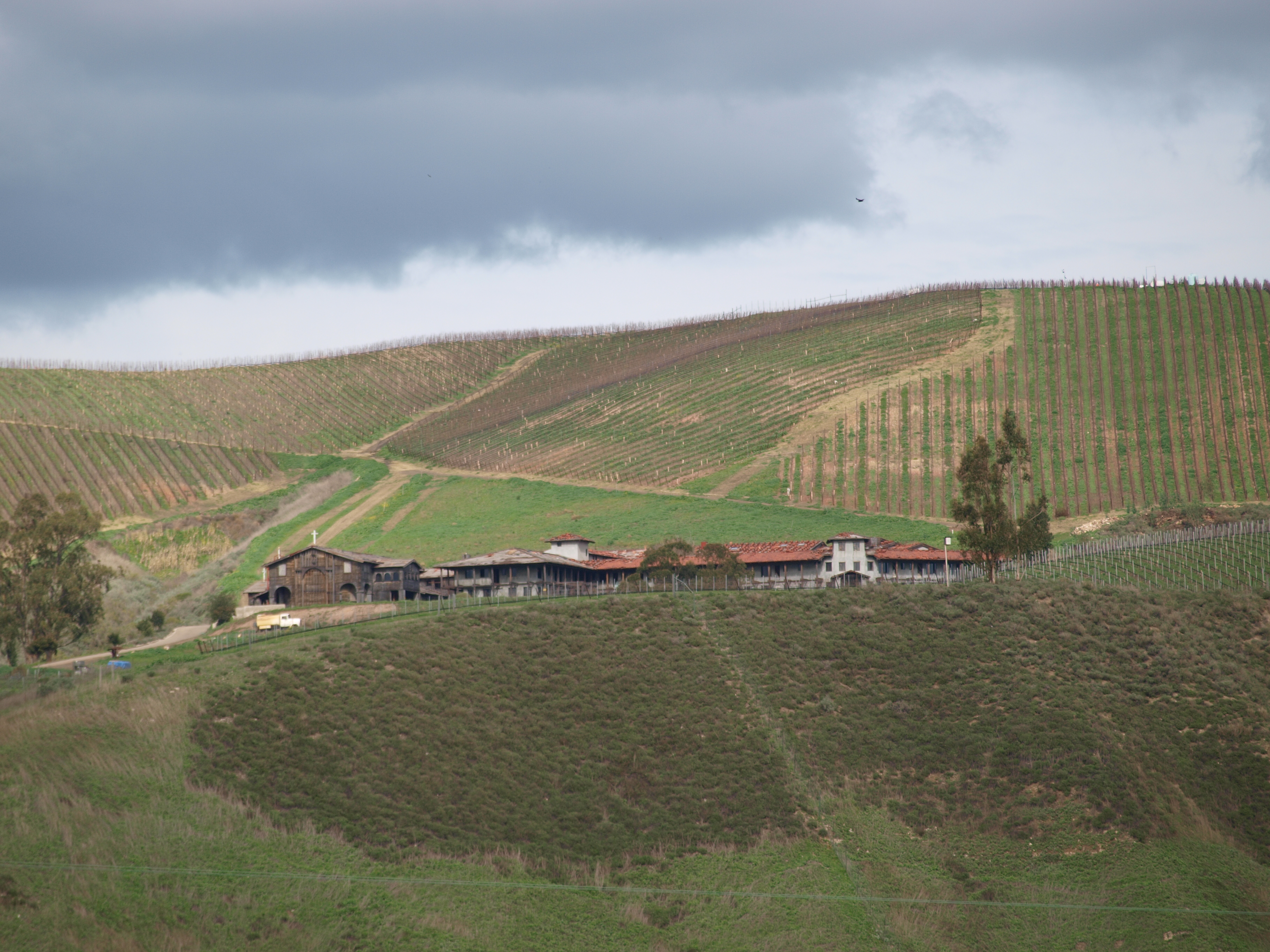 Domaine viticole et son vignoble à Santa Barbara